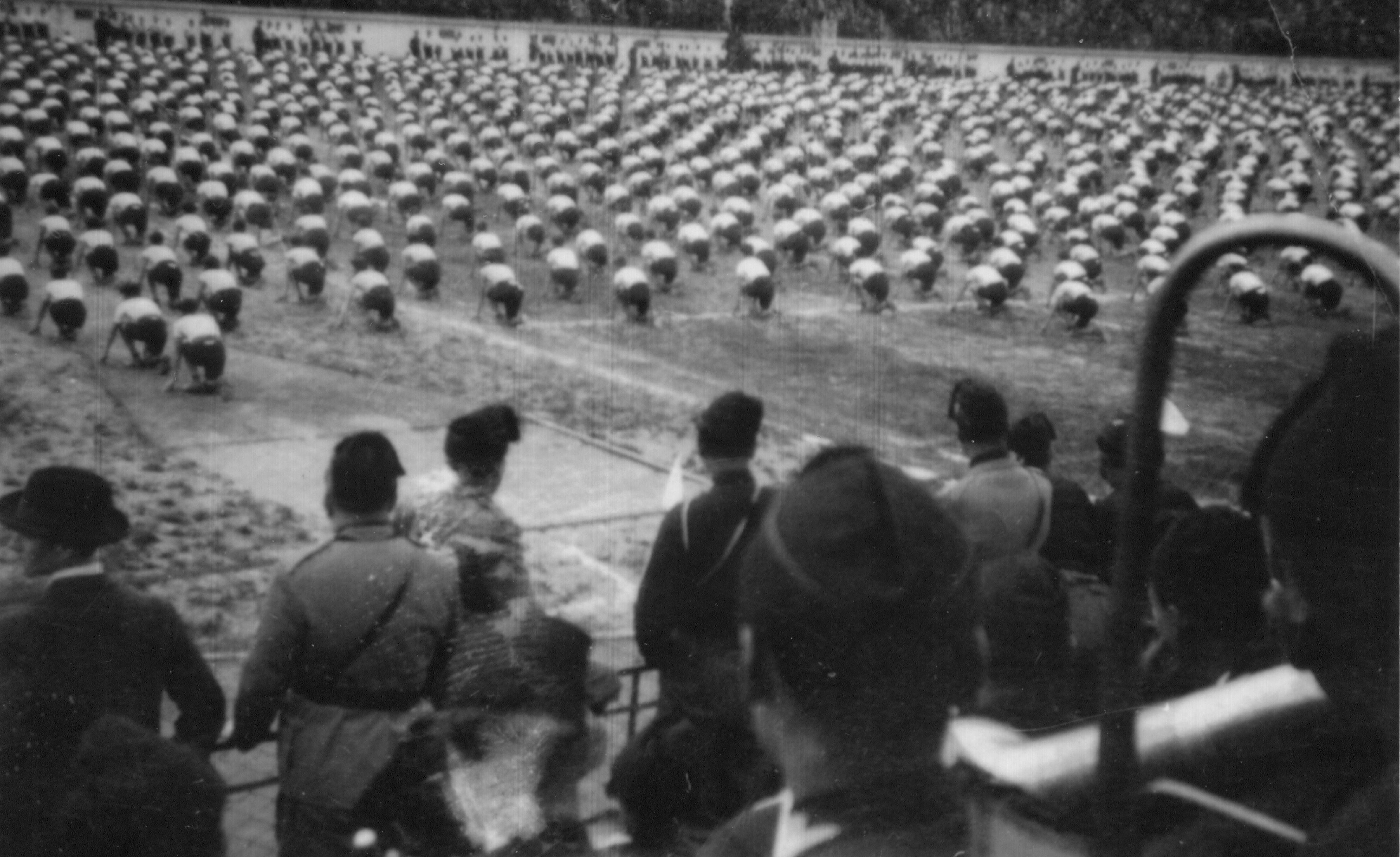 Italia. Un saggio ginnico pubblico eseguito al "Concorso Dux", durante il periodo fascista.